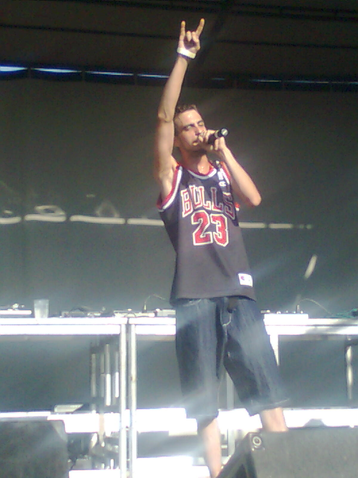 Imagen de Lumier, MC componente del grupo A3Bandas en el concierto Zaragoza Ciudad 2009